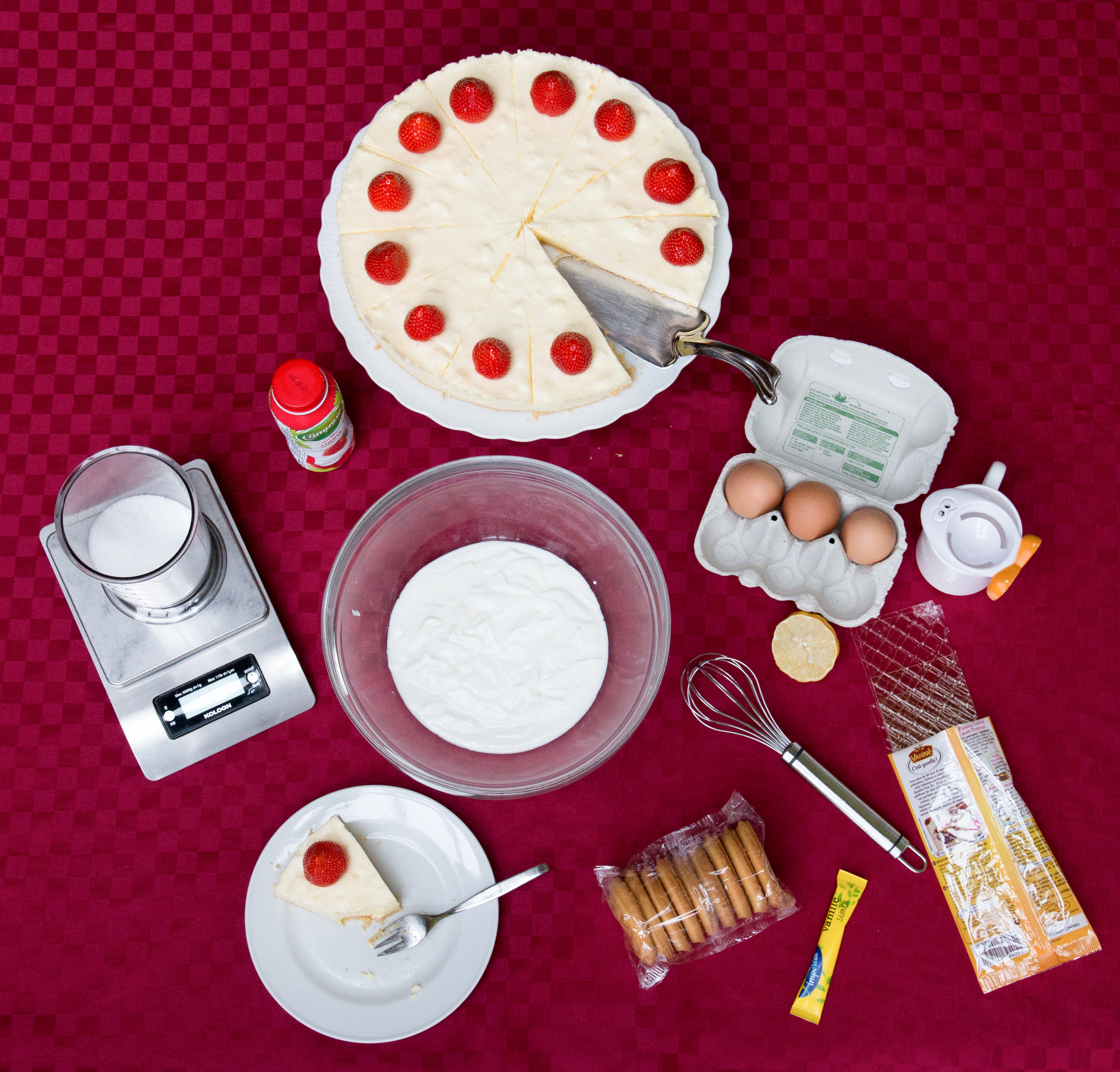 Begin en einde van een kaastaart